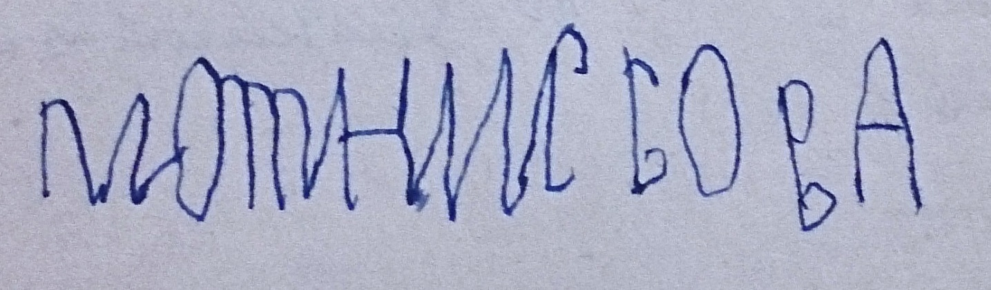 Klavdija Plotnikova allkiri